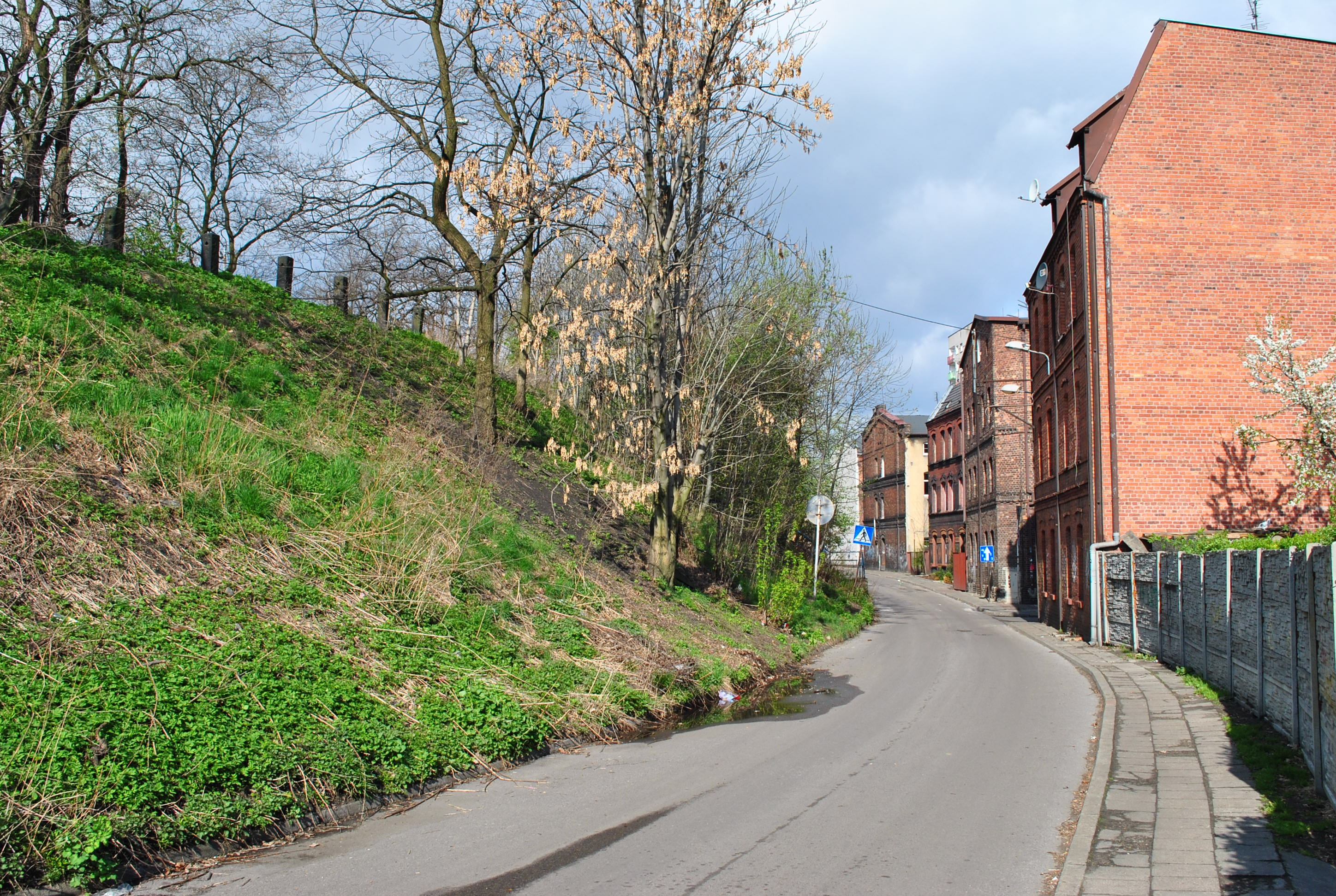 Katowice - Załęże. Ulica ks. Pawła Pośpiecha (widok w kierunku zachodnim)